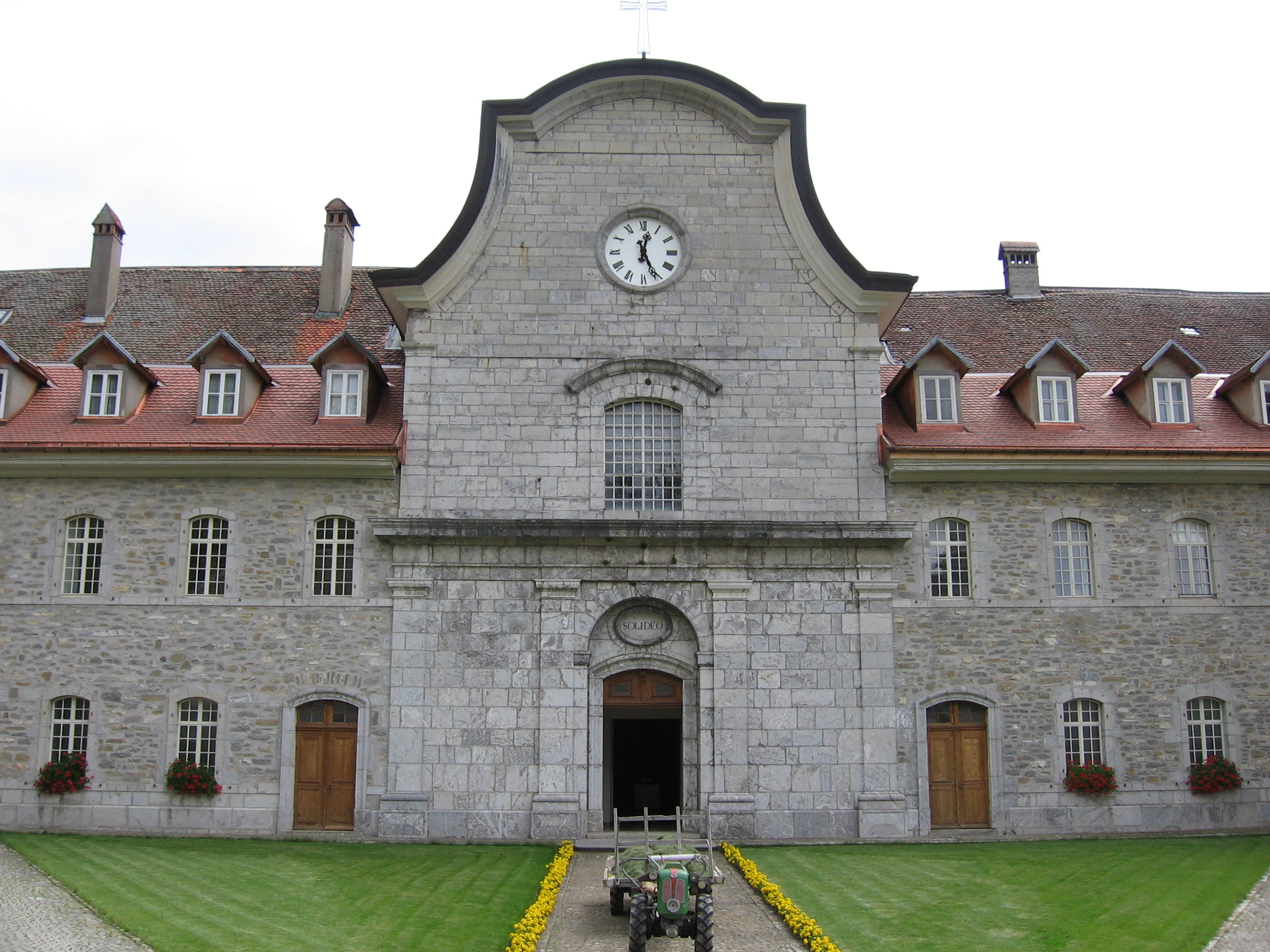 Batiment principal et entrée de l'église de la chartreuse de La Valsainte (Suisse).